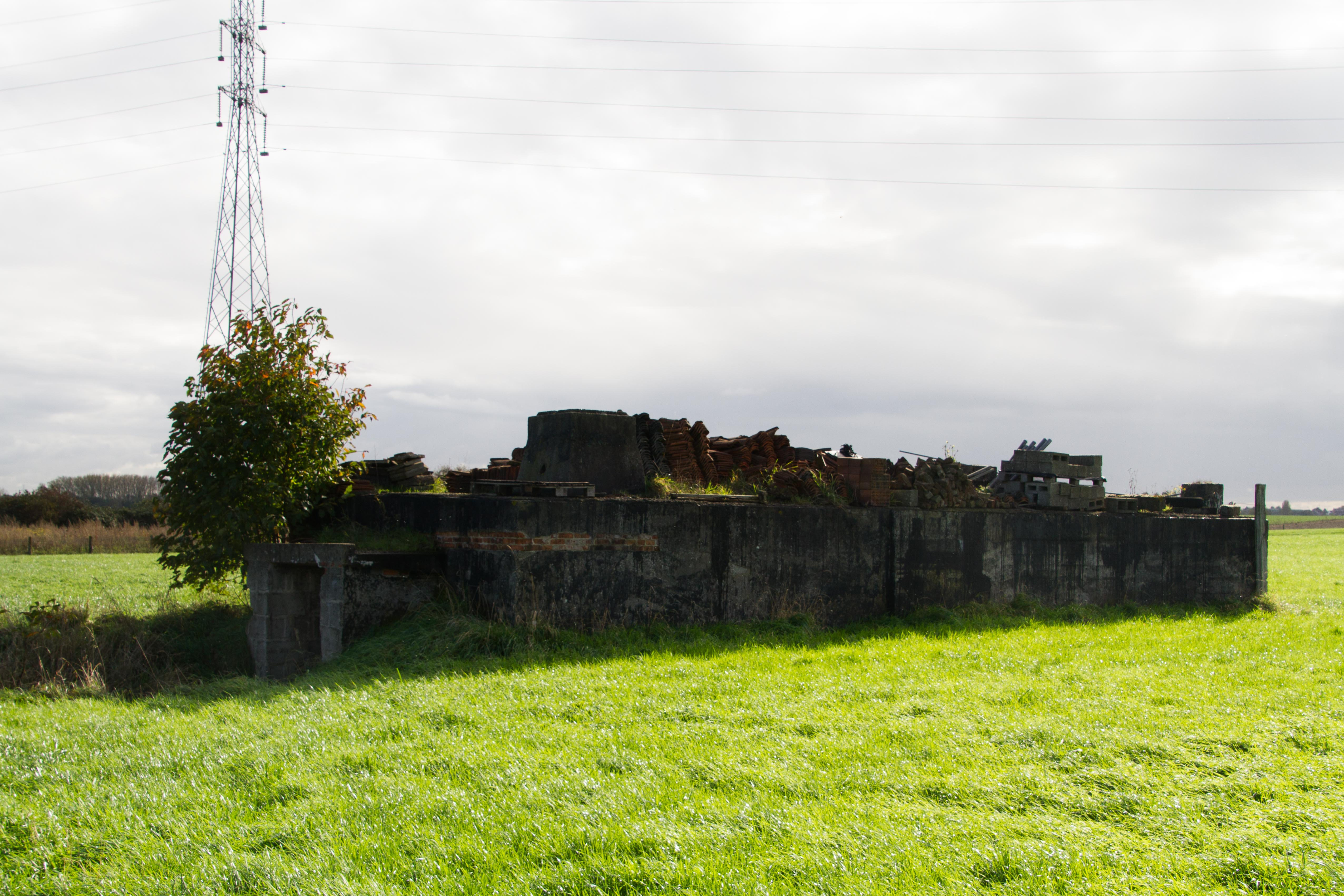 Bunker van Duitse radarbasis met als codenaam “Blindschleiche” in Ternat